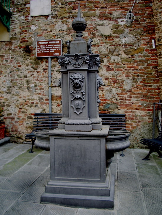 Fontana di Campagnatico